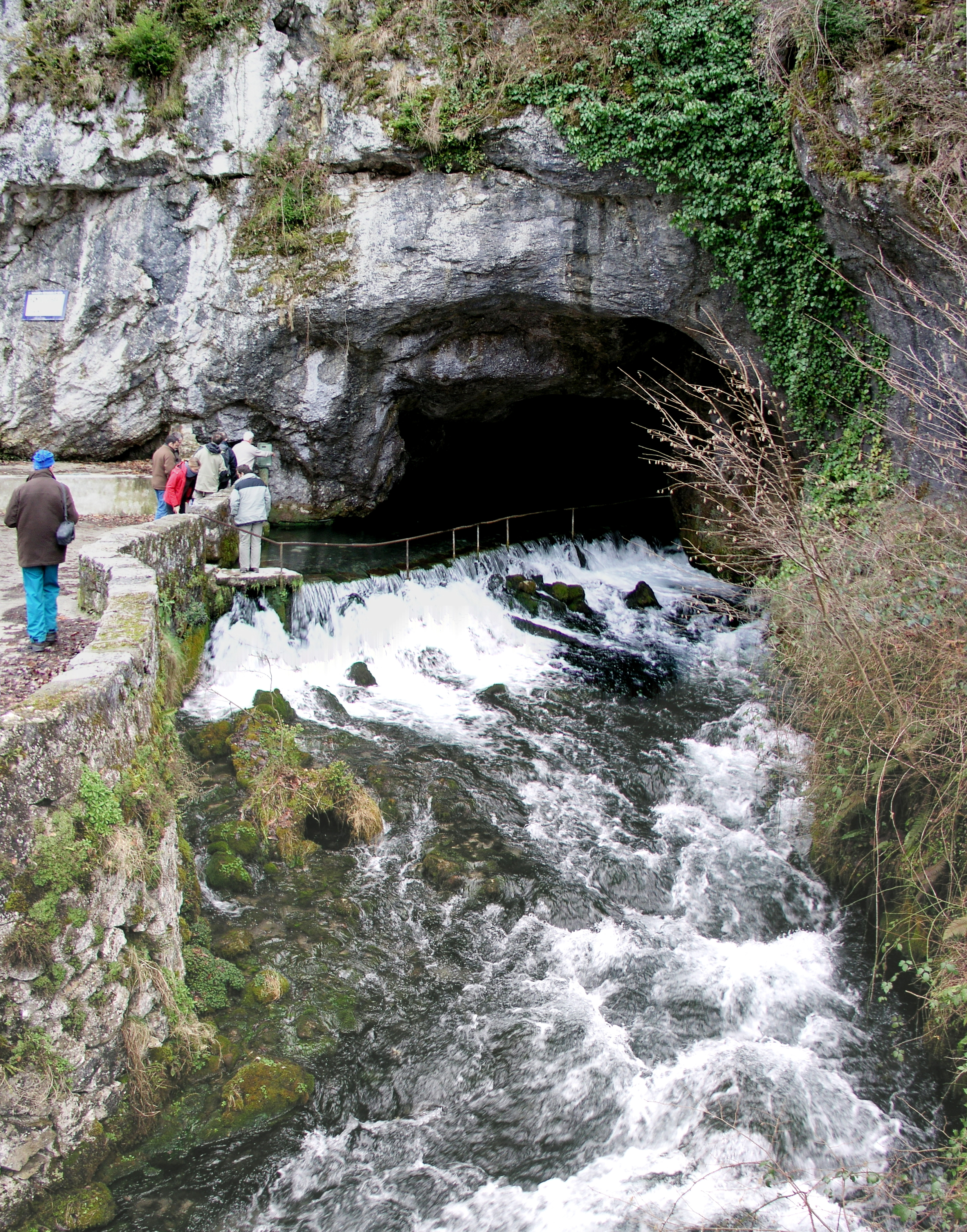 Source intermittente de Fontestorbes (Ariège).